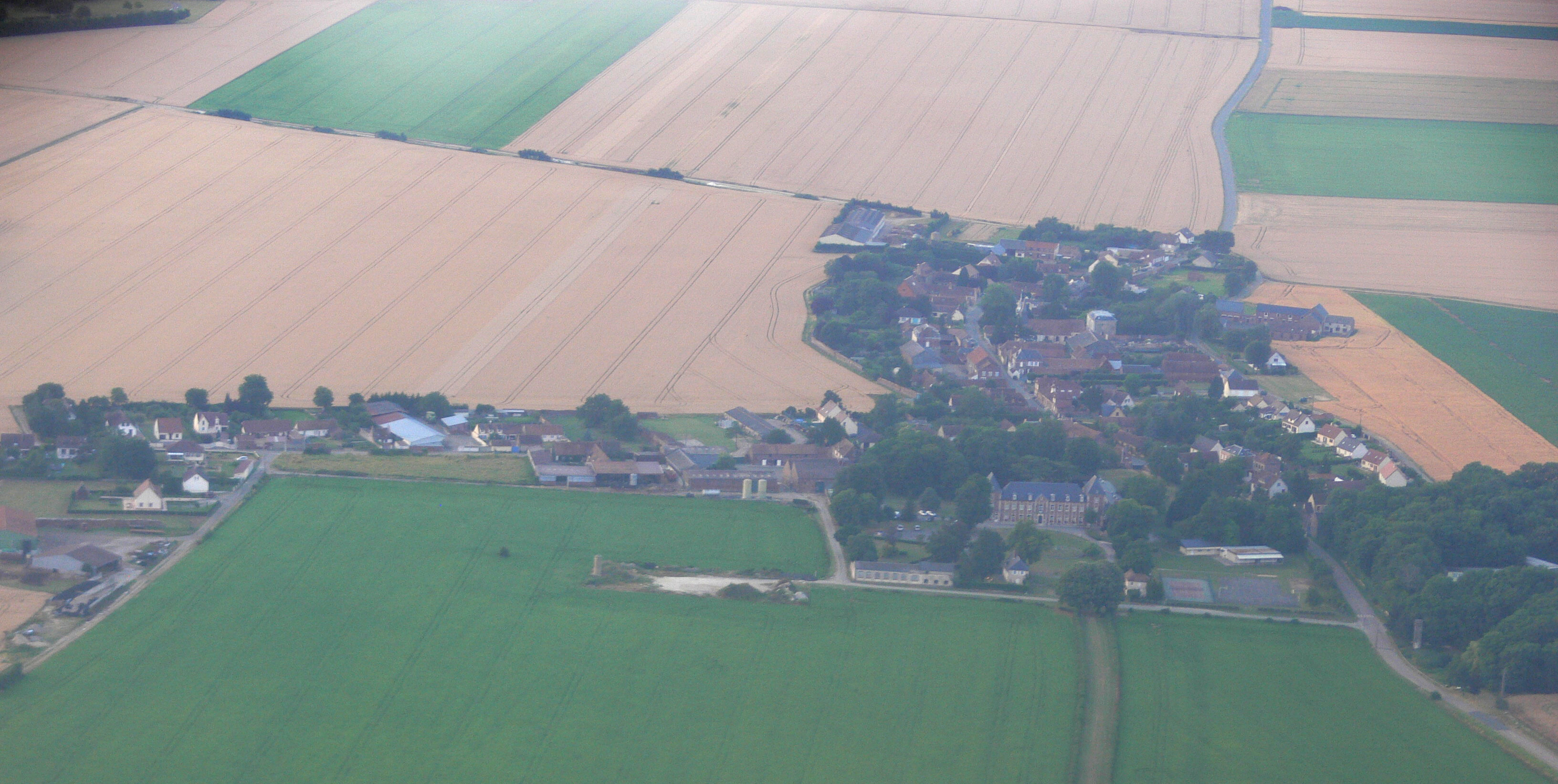 Vue aérienne de la commune de Nivillers (Oise)